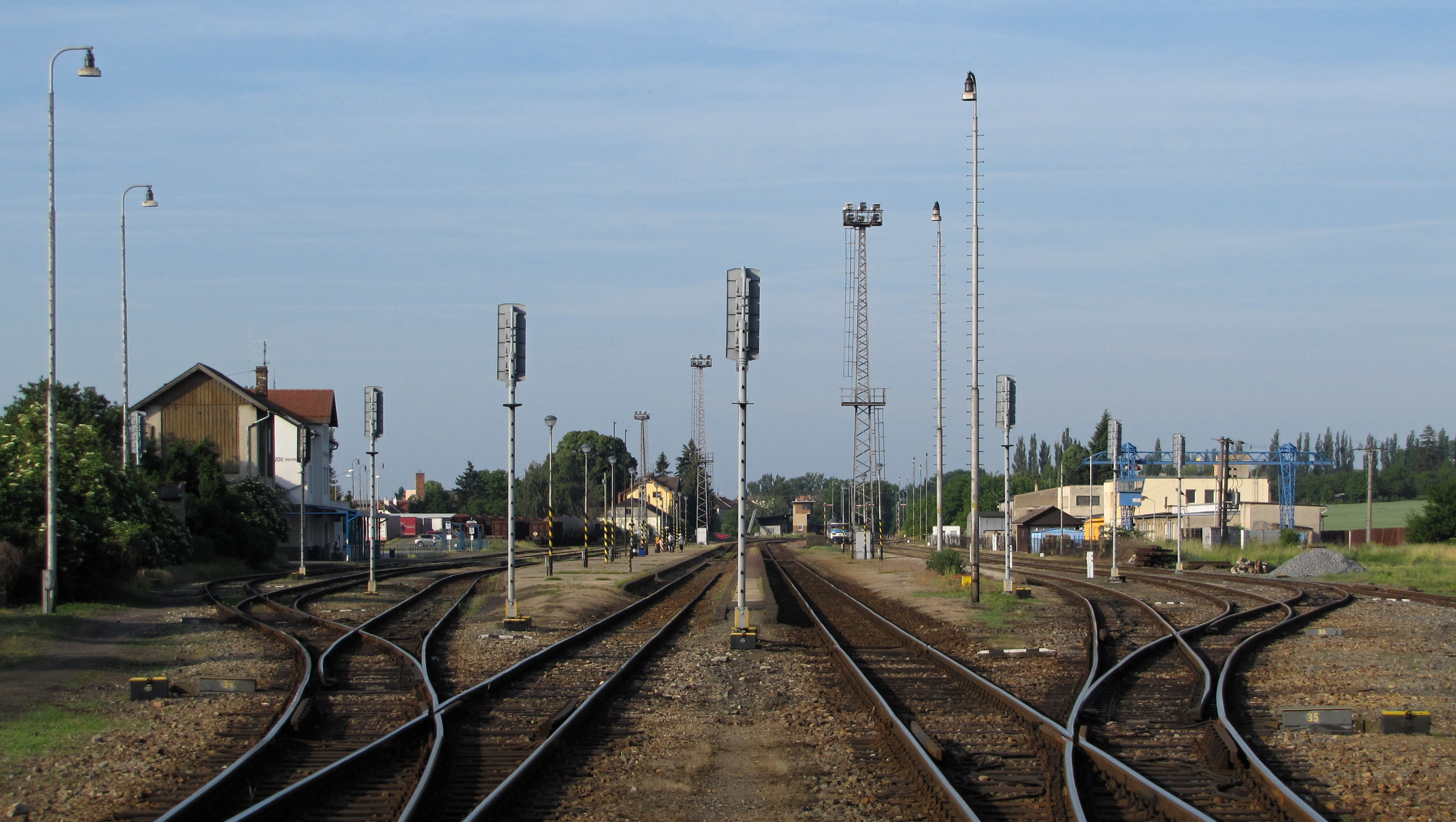 Železniční stanice v Kyjově